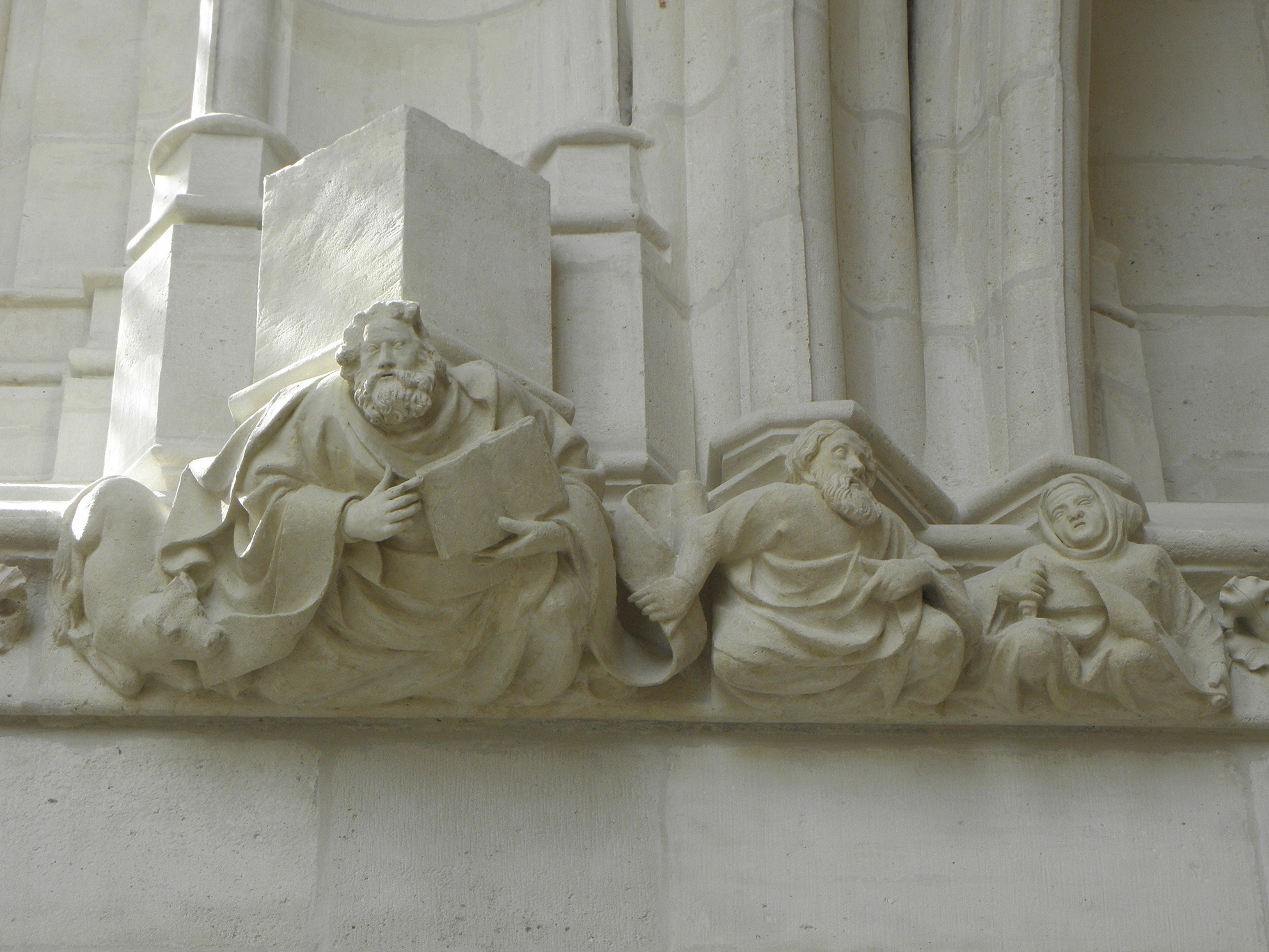 Culot sculpté de la Sainte-Chapelle du château de Vincennes (94). .